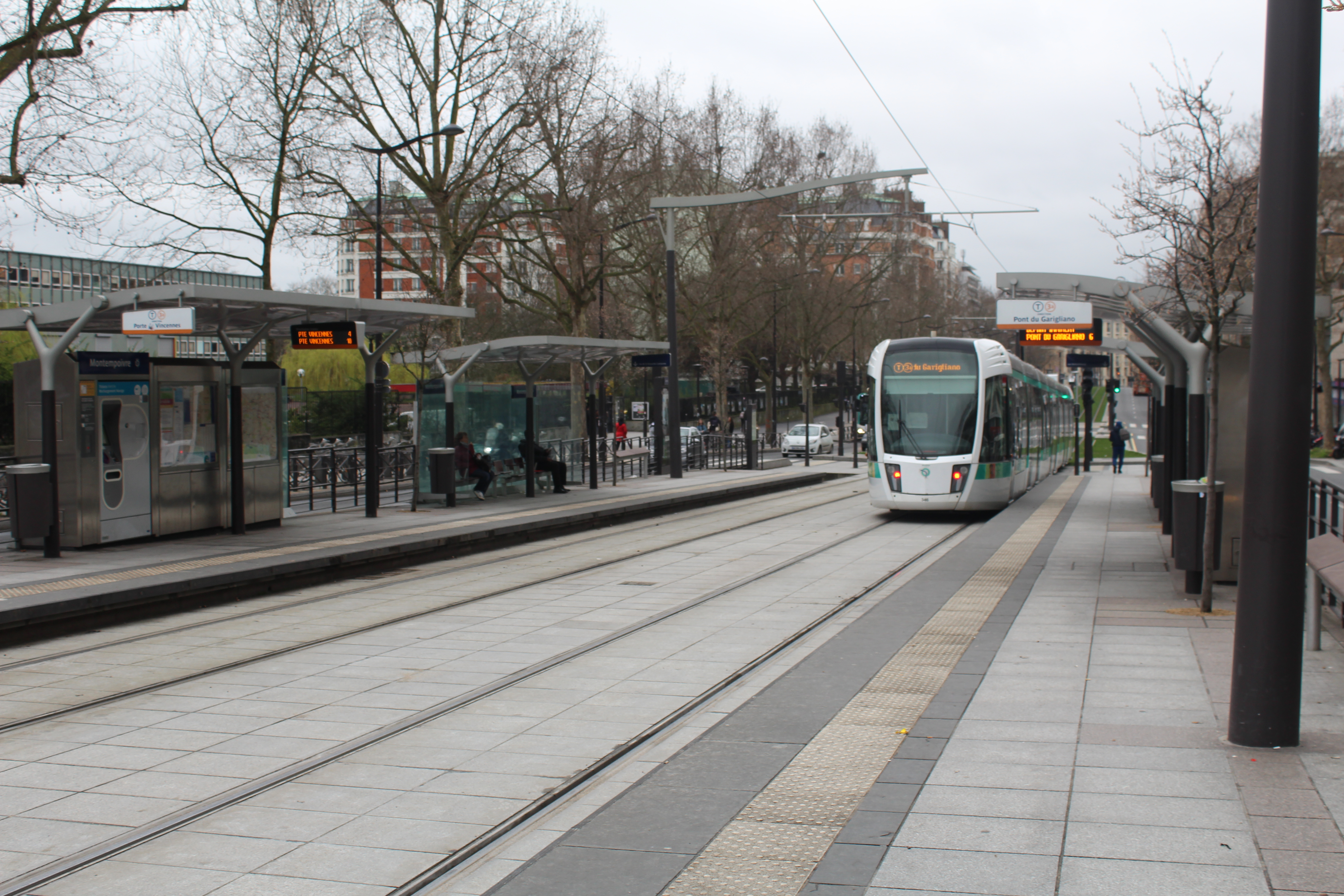 Station de tramway Montempoivre sur la ligne 3a du tramway d'Île-de-France.